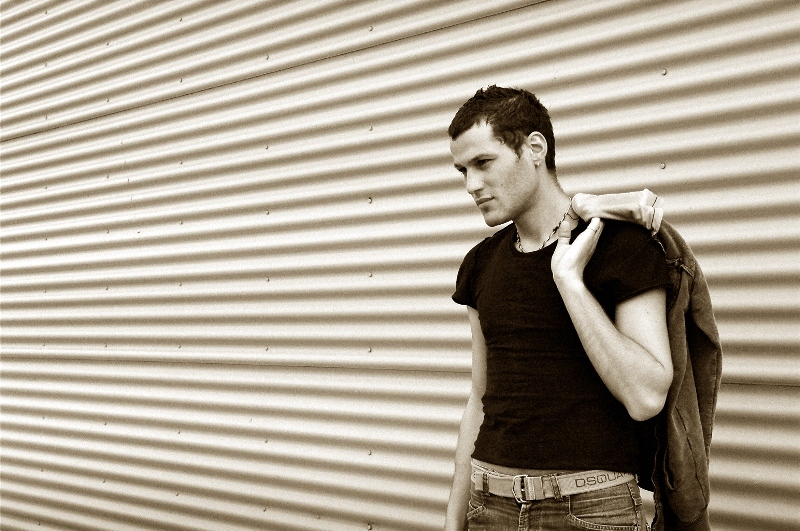 Български актьор